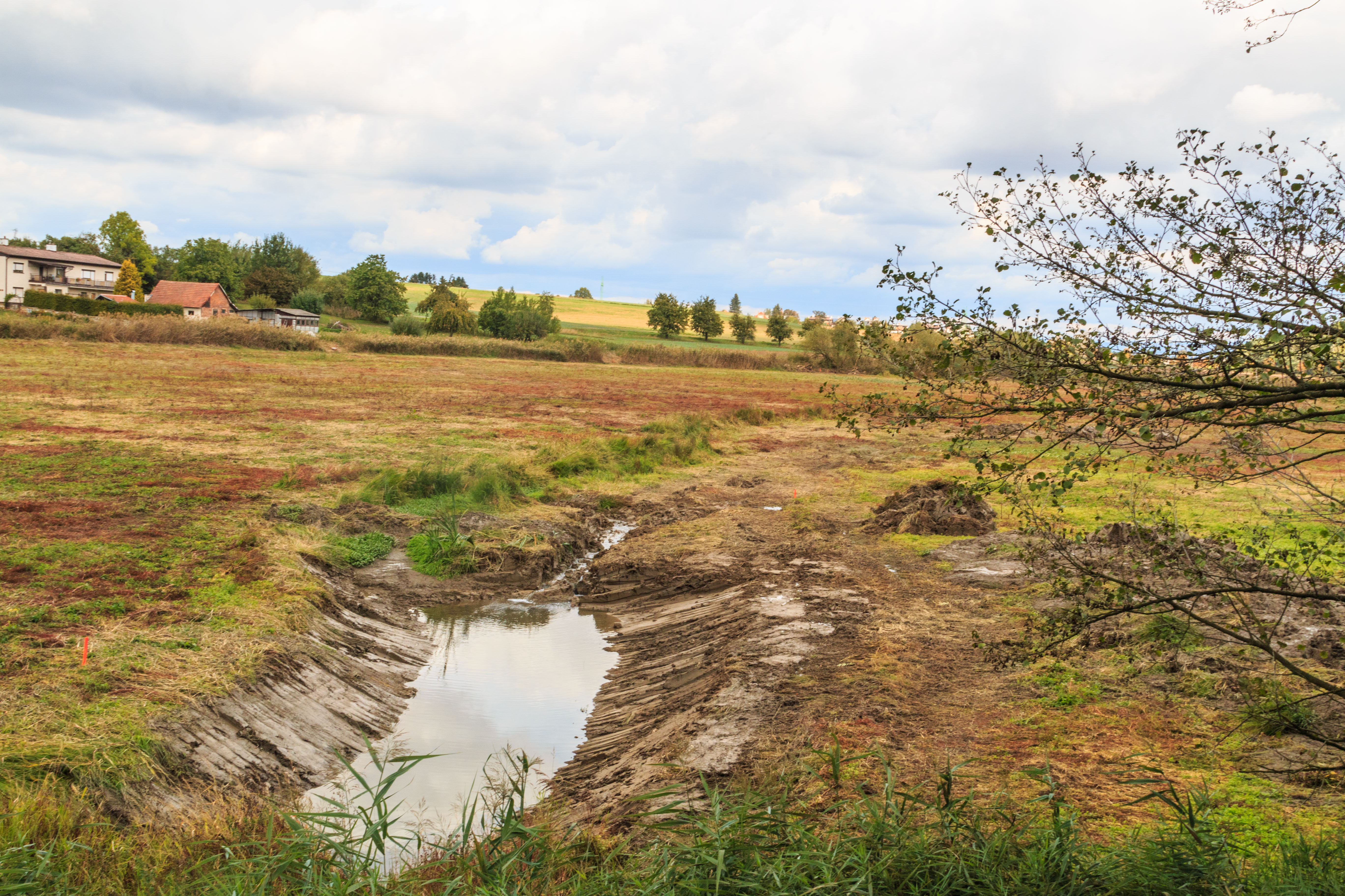 Hoděčínský rybník Project: Vodstvo.